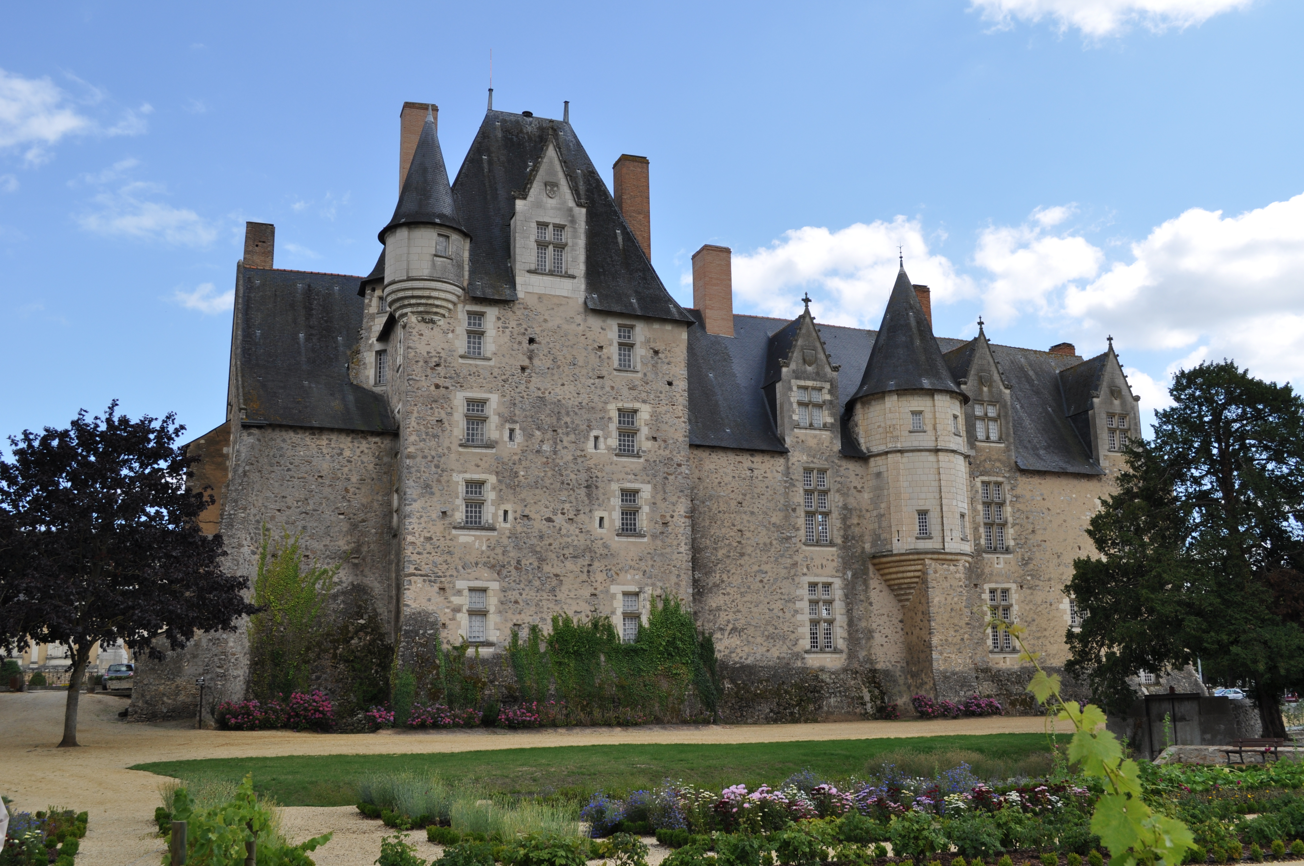 Façade arrière du château de Baugé (Maine-et-Loire, France).